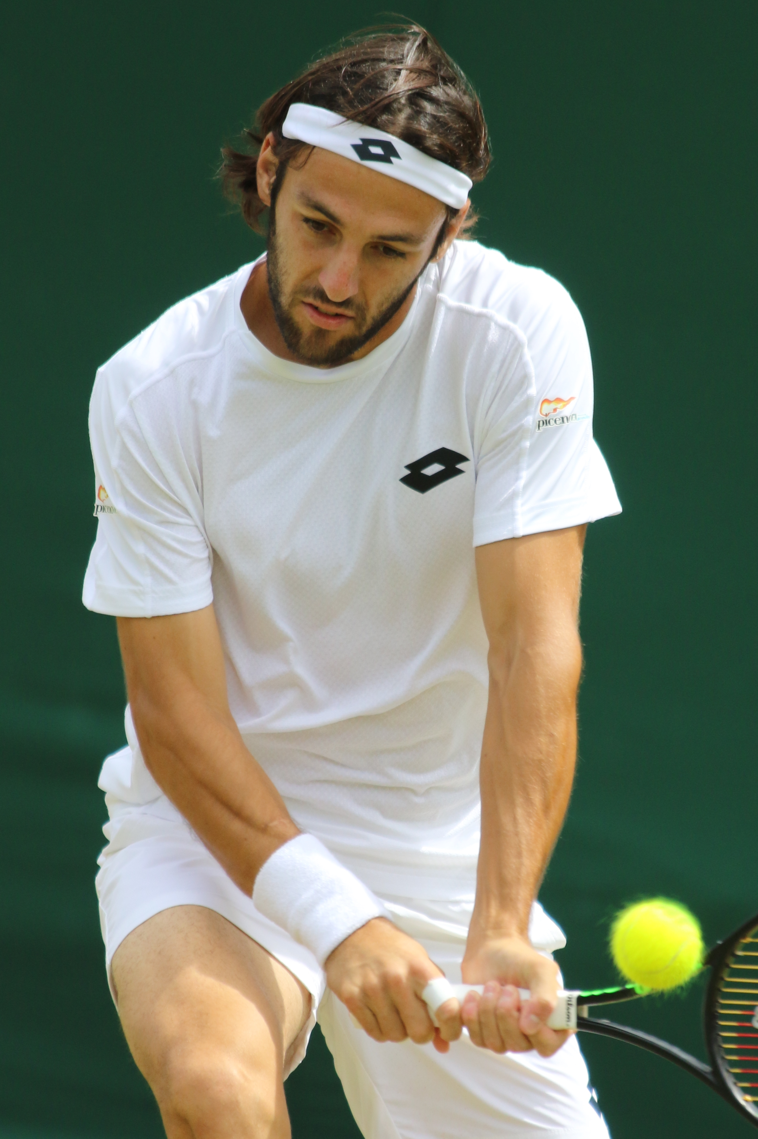 Travaglia WM17 (23)